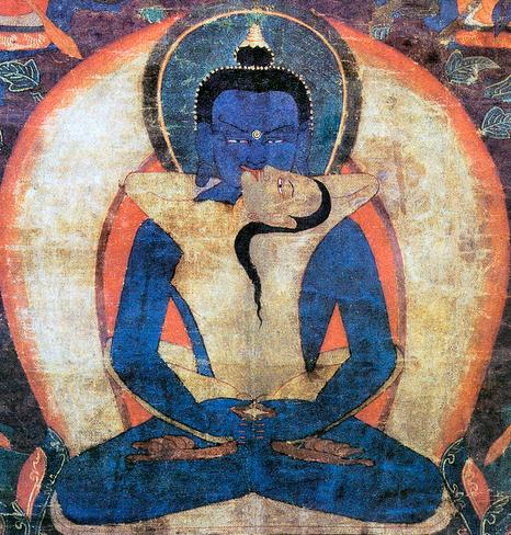 Il buddha originario (Ādibuddha) Samantabhadra in un dipinto tibetano del XVII secolo. È raffigurato nudo e senza alcun attributo perché è solo sé stesso. Qui è presentato simbolicamente unito nell'atto sessuale (yuganaddha, tib. yab-yum) con la sua prajñā Samantabhadrī, che possedendo il suo nome significa che è uguale a lui, da lui viene emanata e con lui si fonde. Il colore del suo corpo è azzurro e simboleggia la vacuità (śunyātā). Essendo un "buddha originario" rappresenta, nel Buddhismo Vajrayāna, il contenuto dell'esperienza del Dharmakāya.